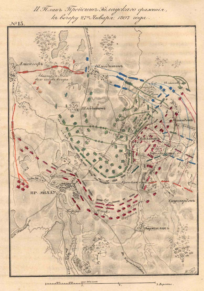 Battle of Preussisch Eylau Map3.jpg